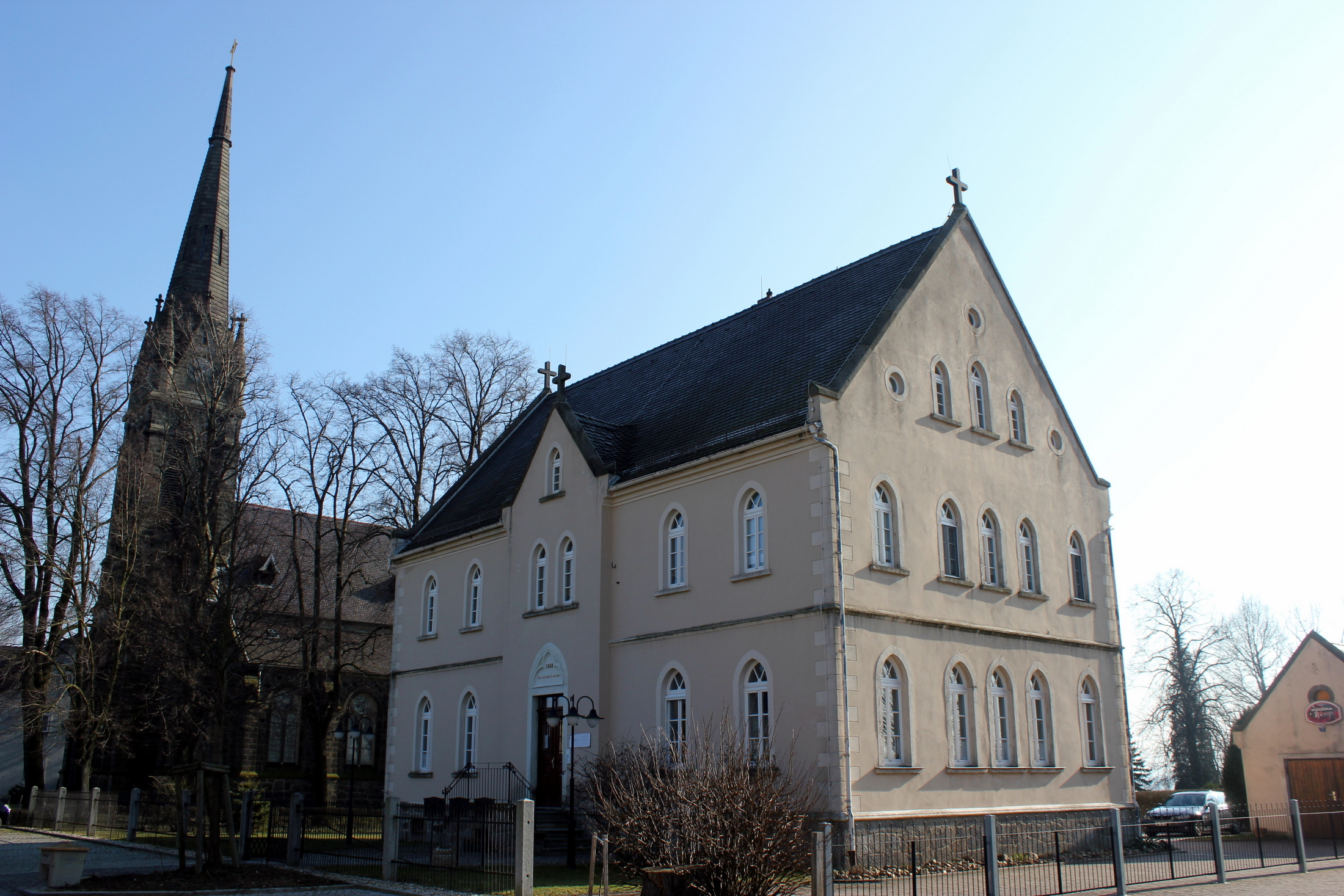 Hornjoserbsce: Baćoń; stara šula a cyrkej Jězusoweje wutroby.